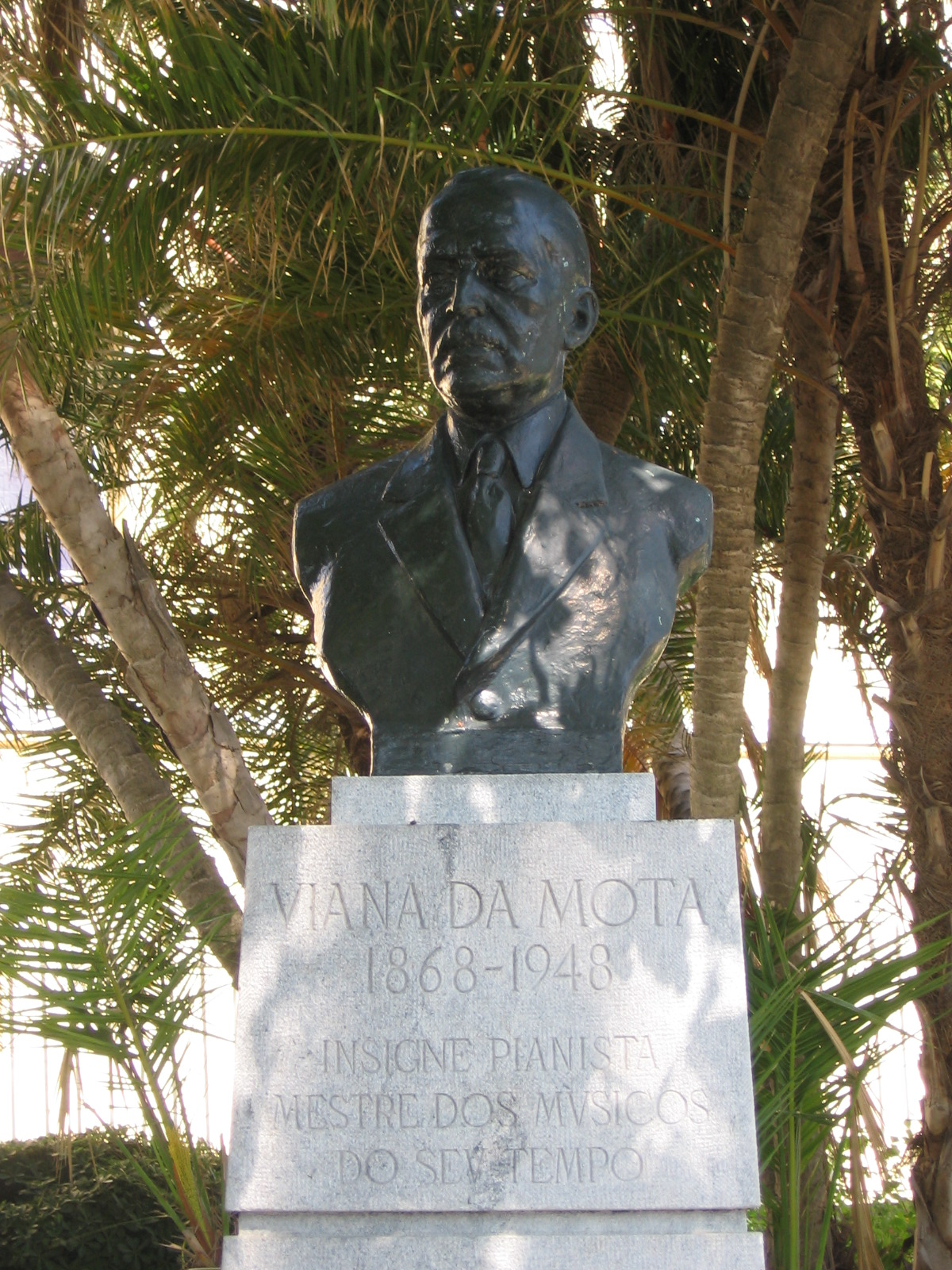 Jardim do Torel